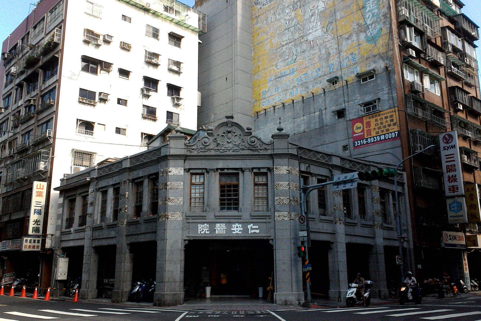 大稻埕仁安醫院,台北市大同區延平次分區延平里